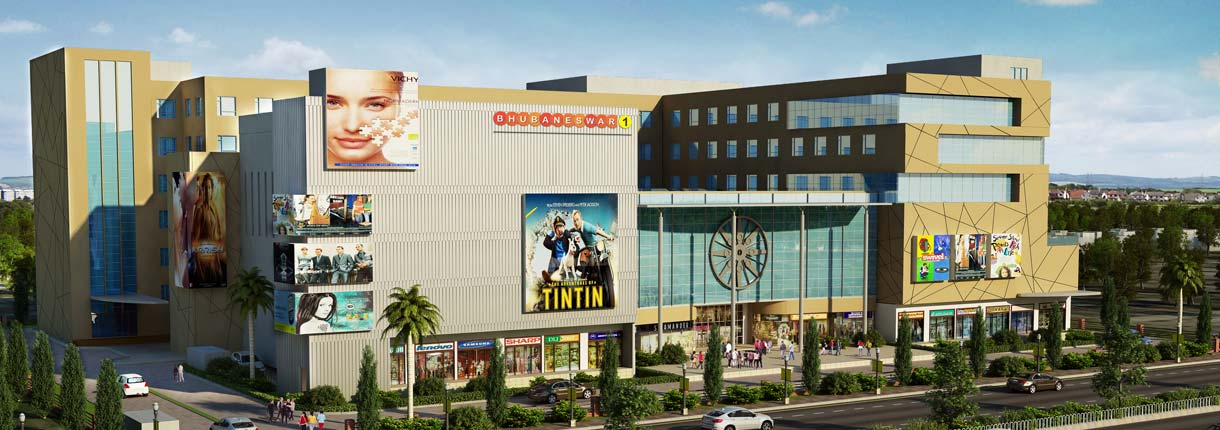 Bhubaneswar 1 mall